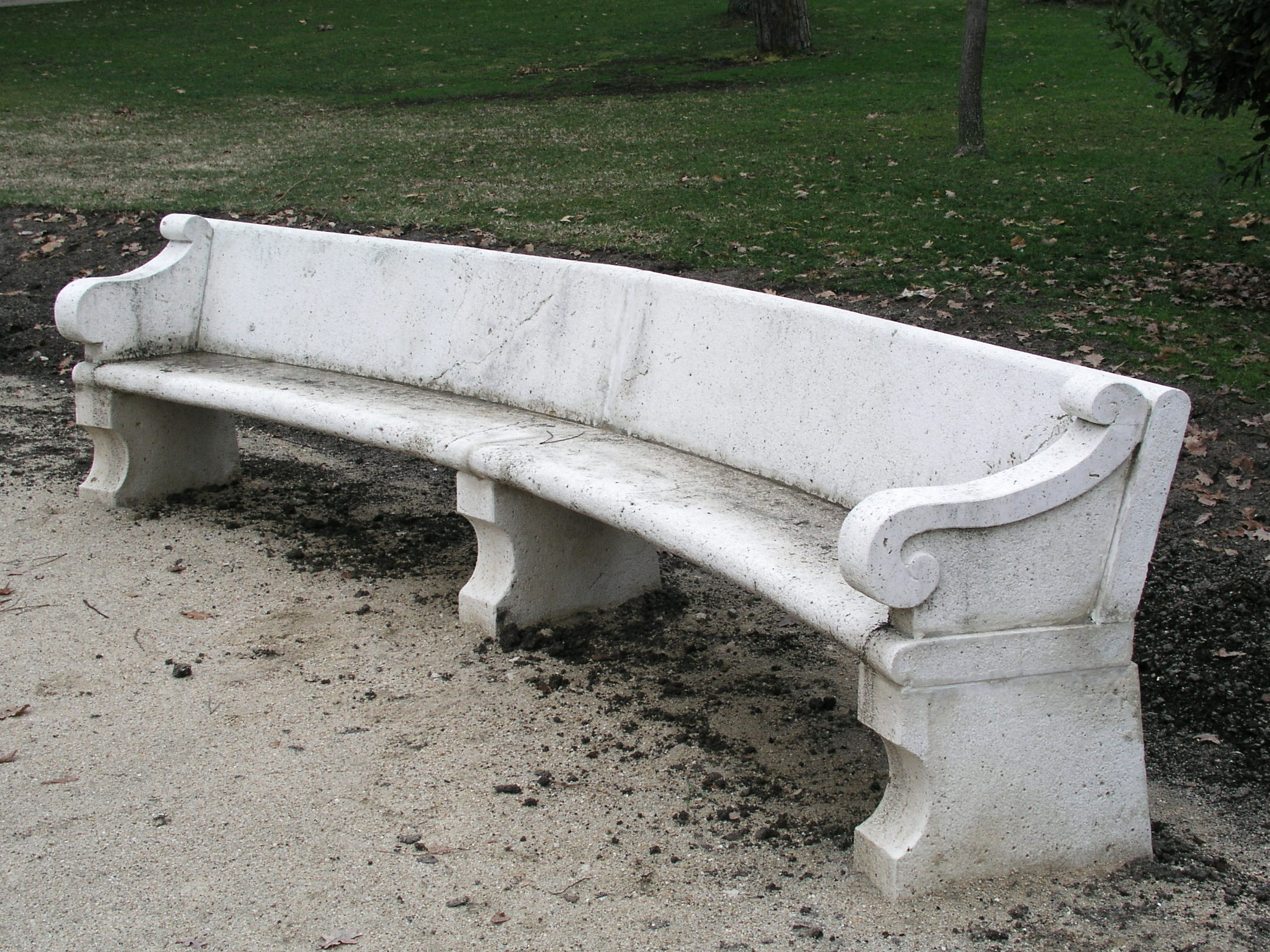 Jardín El Capricho, Madrid, Spain